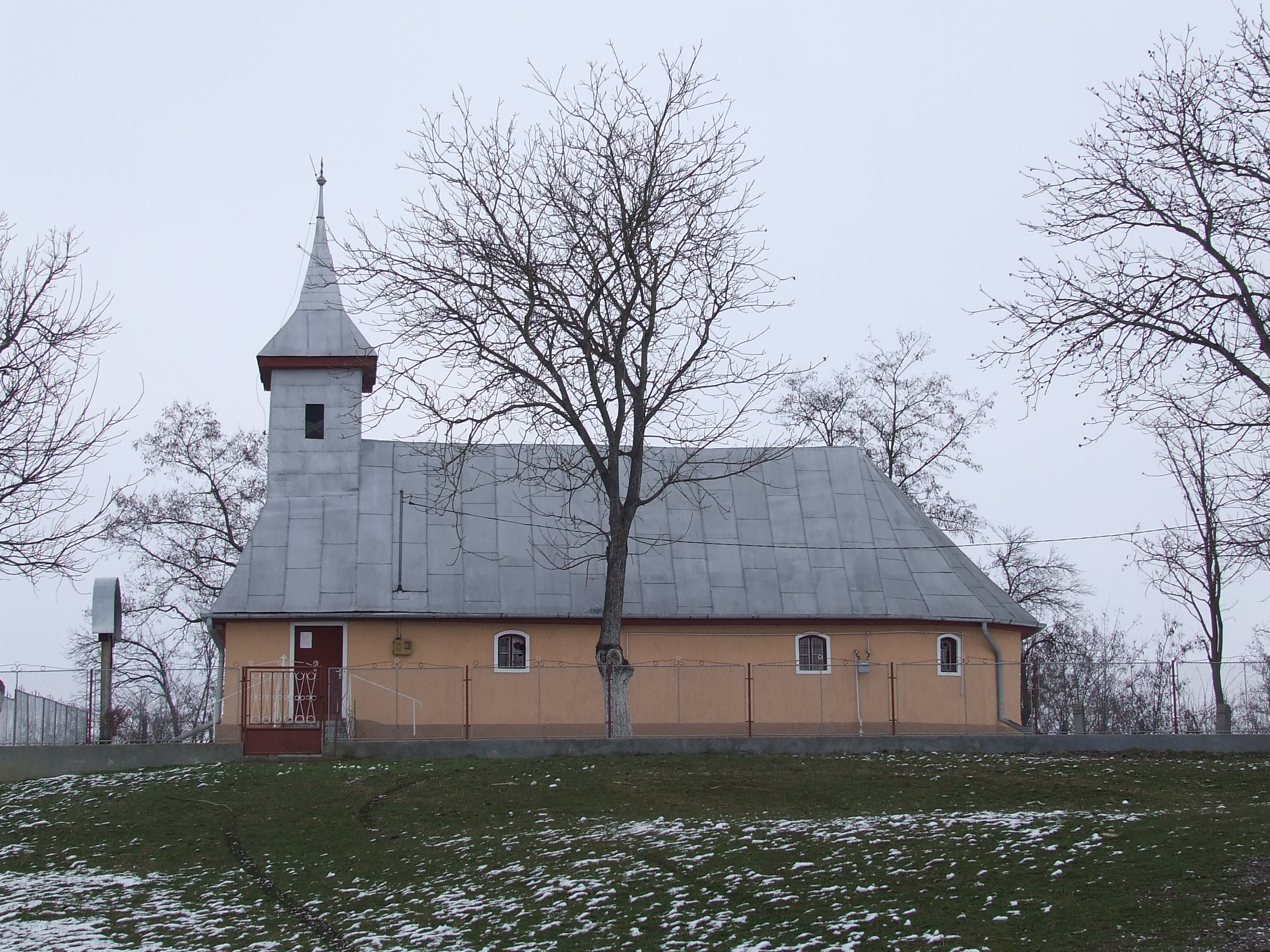 Biserica de lemn din Vaideiu, judeţul Mureş.